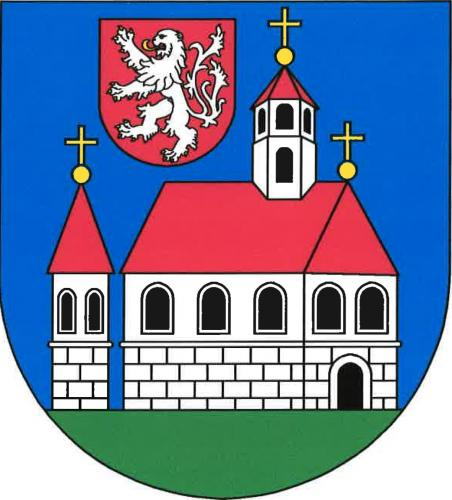 znak, Kostelec nad Labem, okres Mělník